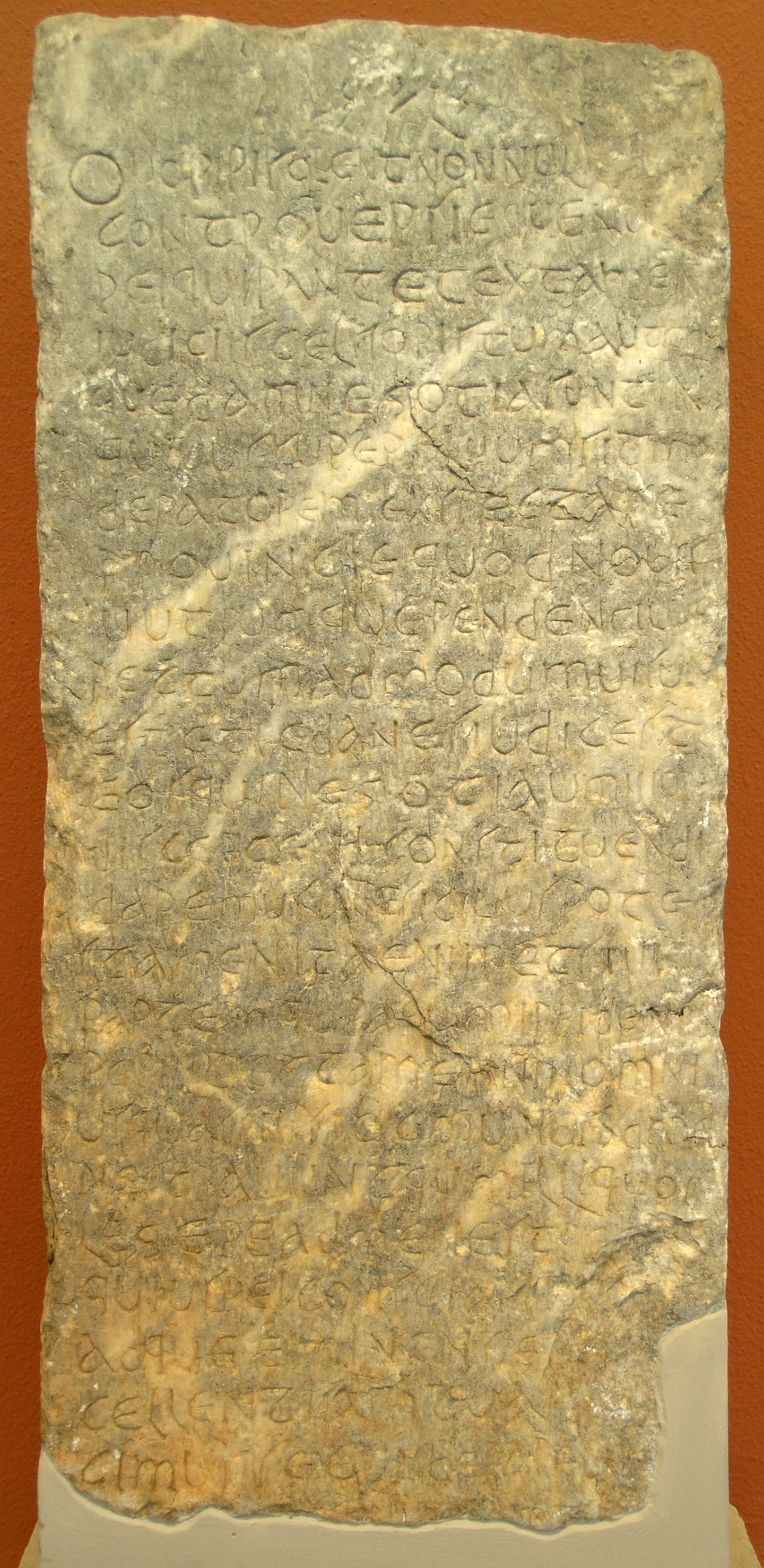 Lettre - édit de l'empereur Julien à Secundus, préfet du prétoire d'Orient concernant le jugement d'affaires mineures. Copie en latin trouvée à Amorgos. vers 362 ap. J.-C..